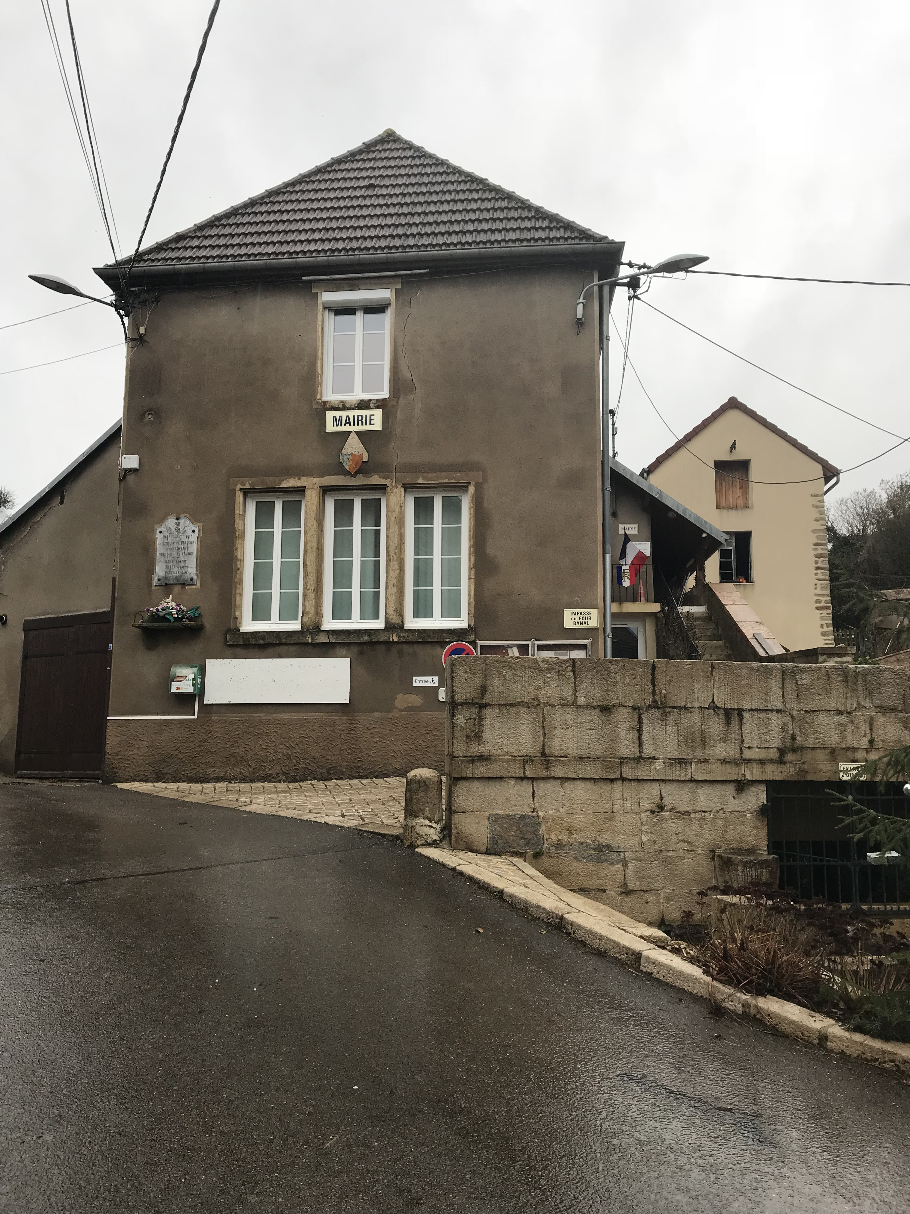 Gredisans (Jura) en janvier 2018.